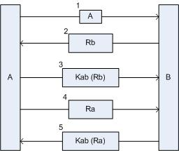 visio plaatje voor Authenticatie gebaseerd op een geheime gedeelde sleutel